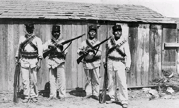 Soldados del VIII Batallón de Mexicali, 1911 durante la Rebelión magonista de Baja California.